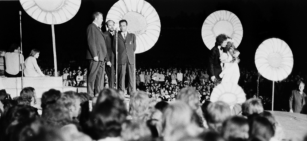 RAM-3 (kvartett) ja Jaak Joala pulmrongkäik Tallinna lauluväljakul 1973